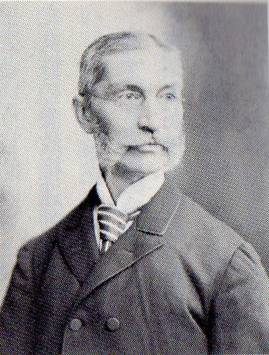 アメリカ合衆国長老教会の日本派遣宣教師エドワード・ローゼイ・ミラー